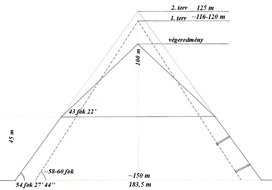 Tört falú piramis (bent pyramid) tervezési és építési szakaszai